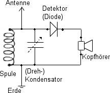 Detektor-Empfänger, Schaltbild